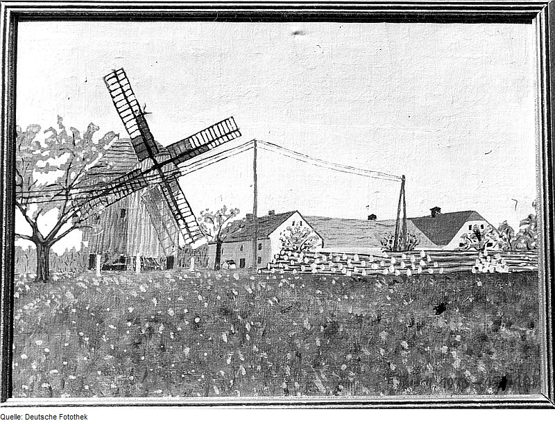 Original image description from the Deutsche Fotothek Neschwitz-Saritsch. Bockmühle und Gehöft, Gemälde, Erich Pusch, Übigau